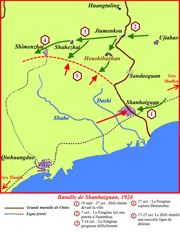 Bataille de Shanhaiguan, 1924